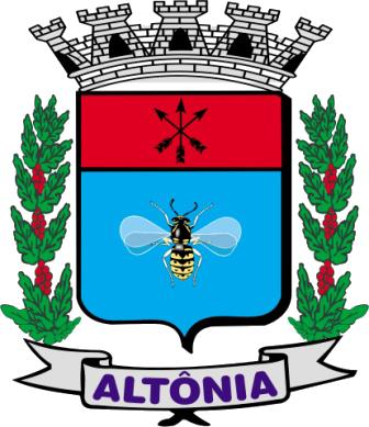 Brasão de Armas do Município de Altôna - Paraná